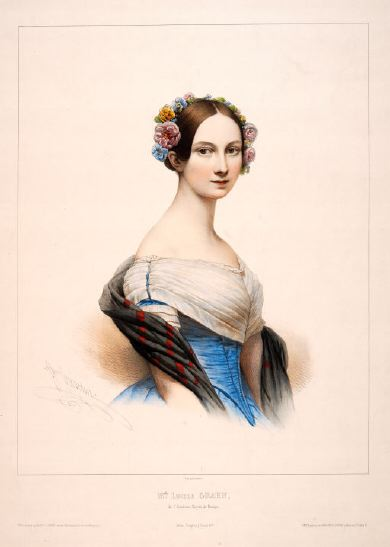 Mlle Lucile Grahn de l'Académie Royale de Musique